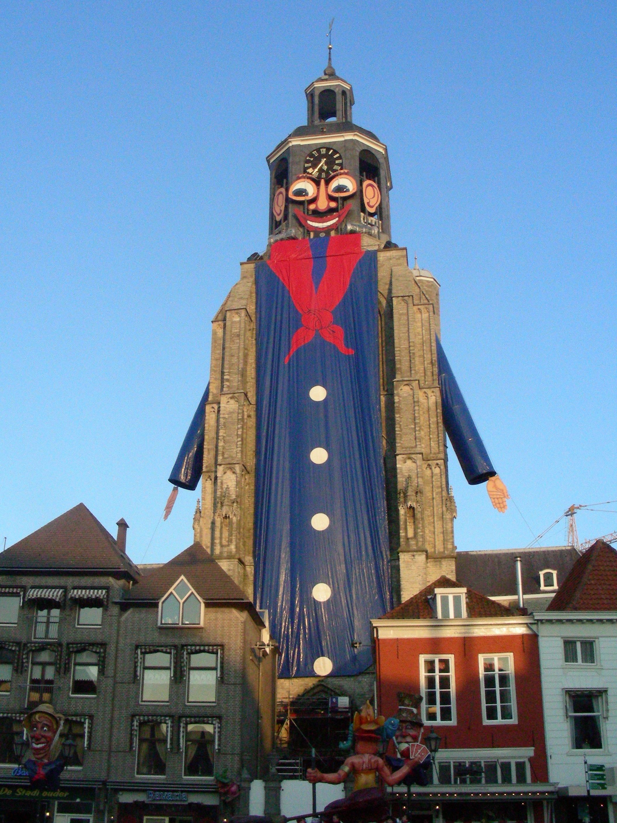 versierde kerk van bergen op zoom tijdens carnaval, zelfgemaakte foto genomen in 2006